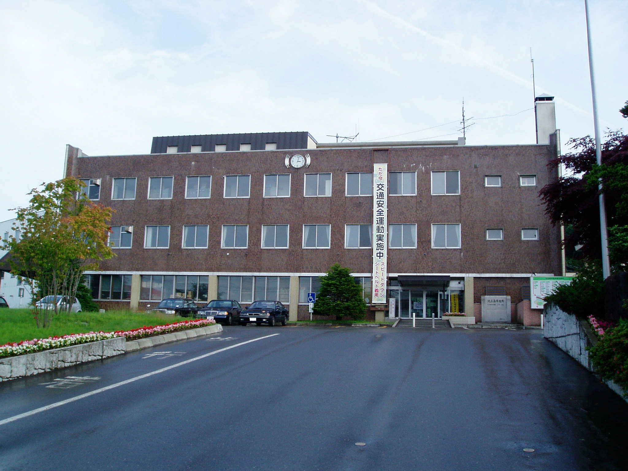 Kitahiroshima City Hall in Hokkaido, Japan